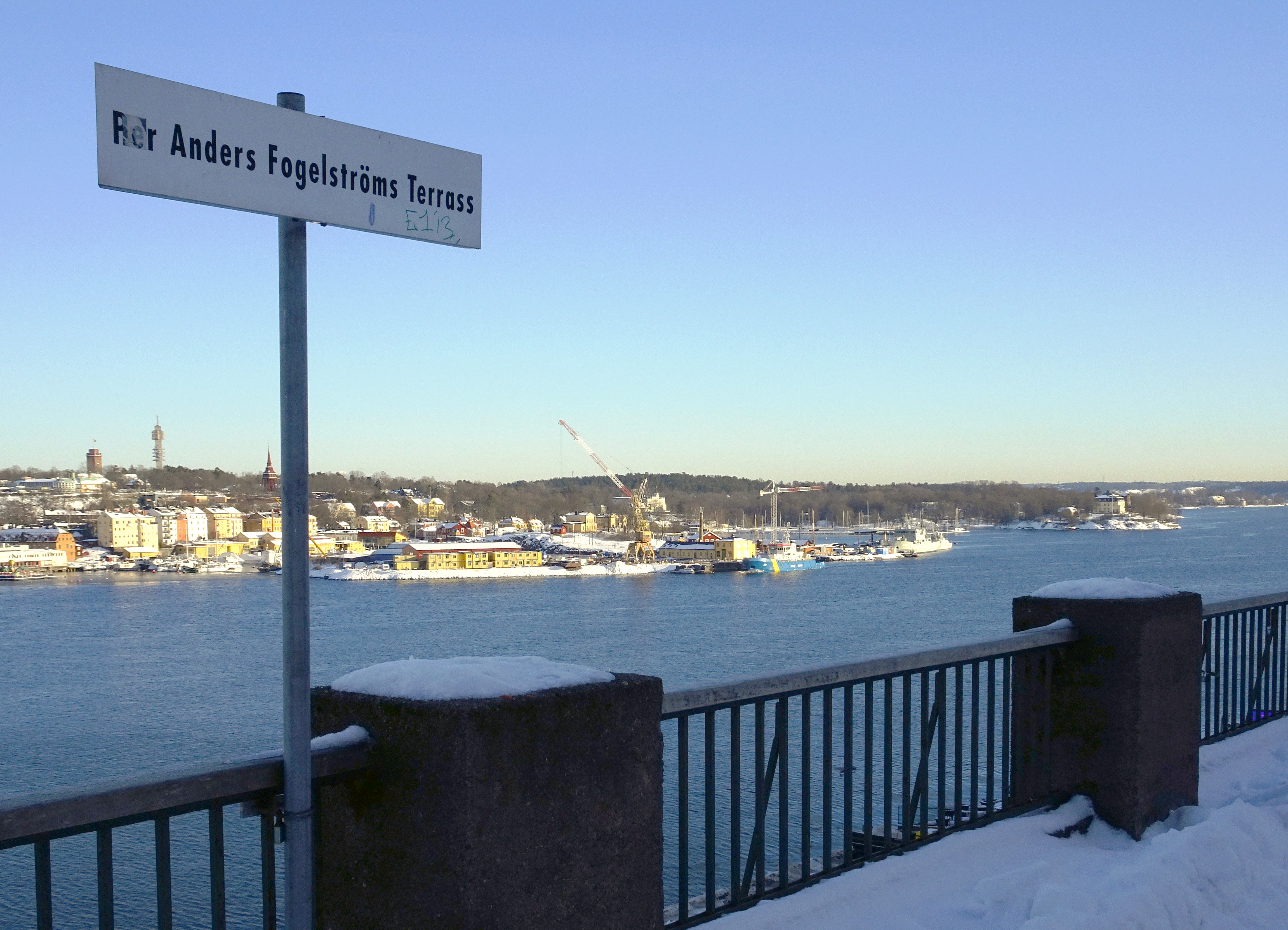 Per Anders Fogelströms terrass vid Fjällgatan